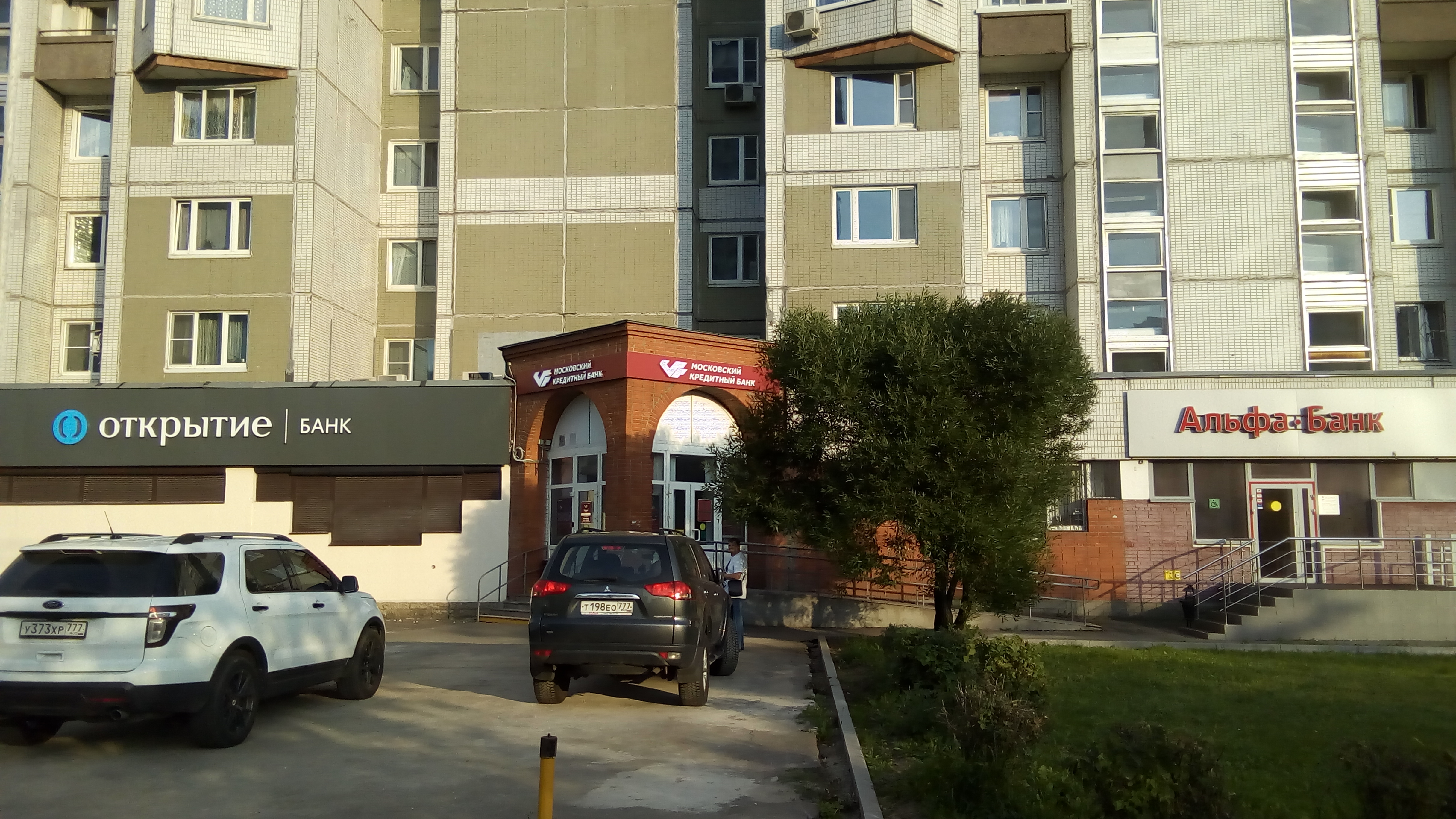 Банки в доме 56/2 на улице Перерва в Москве. Слева направо — Банк «Открытие» (вход не показан, слева от фото), «Московский кредитный банк» и «Альфа-Банк»